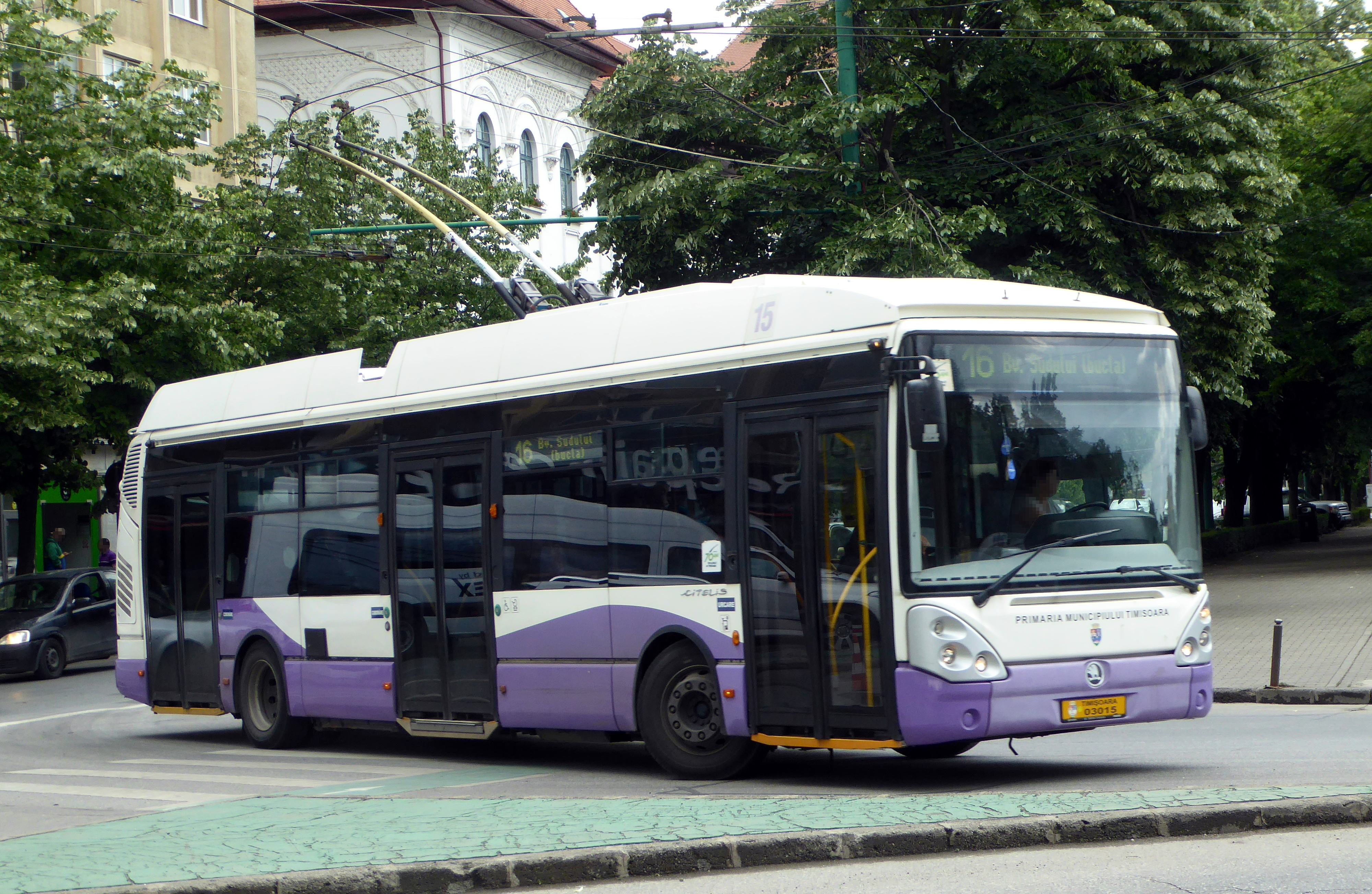 Temeswar (RO), O-Bus biegt vom B. Constantin Diaconovici Loga in den B. Regele Ferdinand I ein.